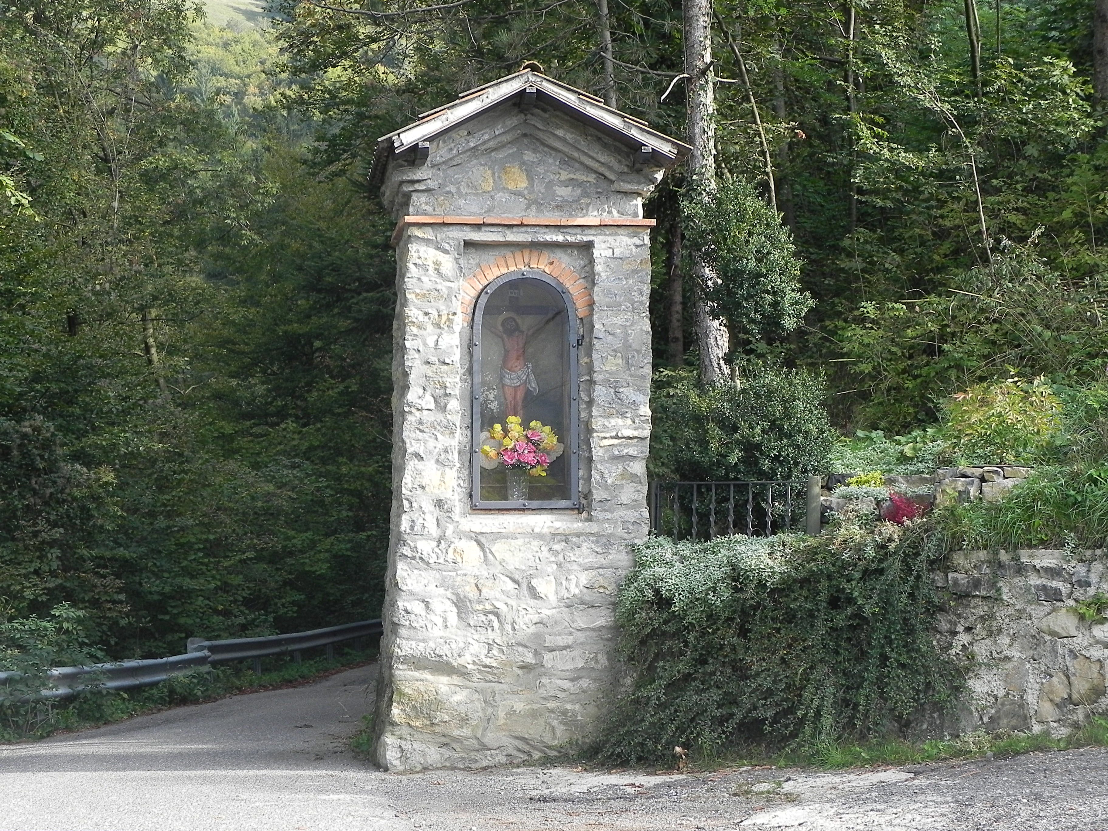 Santella sulla strada che conduce in contrada Peroli Alti- Gorno